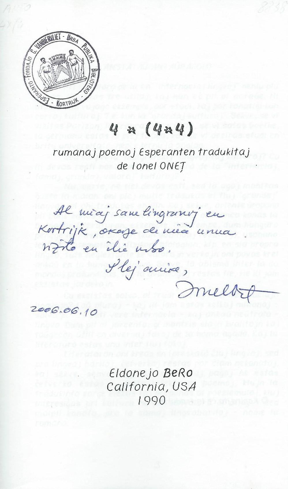 Librokovrilo de "Rumanaj Poemoj",1990